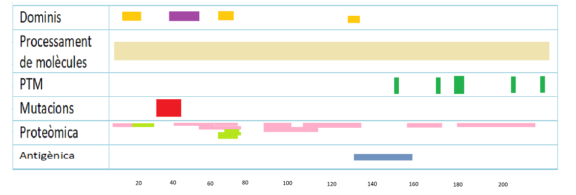 Parts de la seqüència de la proteïna Rab-39a